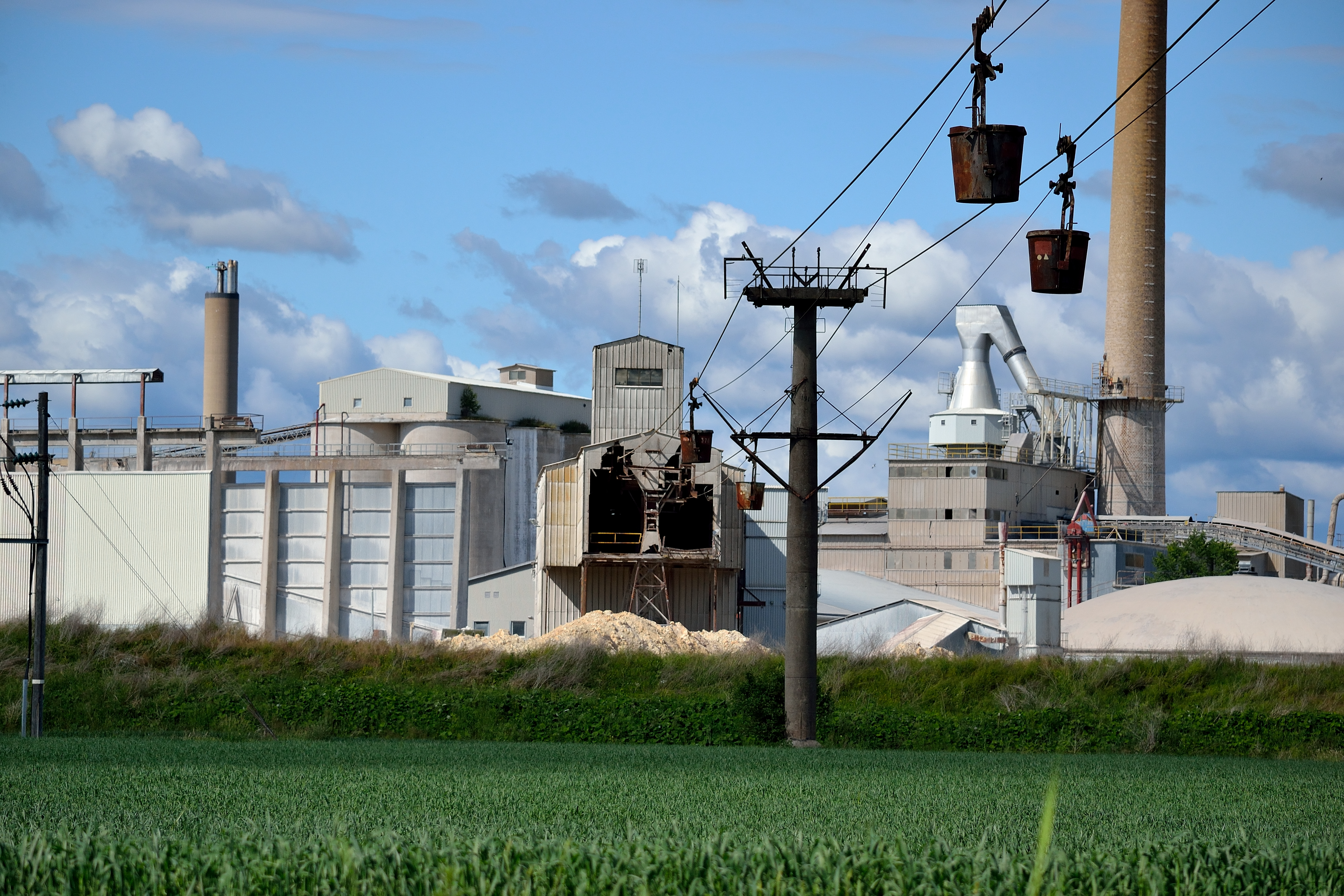 Kalkfabrik Köping